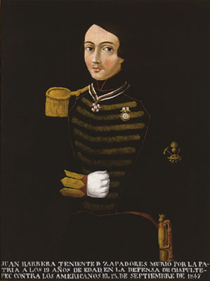 Retrato del cadete Juan de la Barrera. Nació en la ciudad de México en 1828. Autor: Santiago Hernández y Ayllón. Siglo XIX.